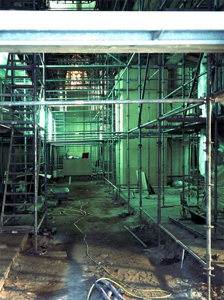 Renovierung St. Nicolai innen